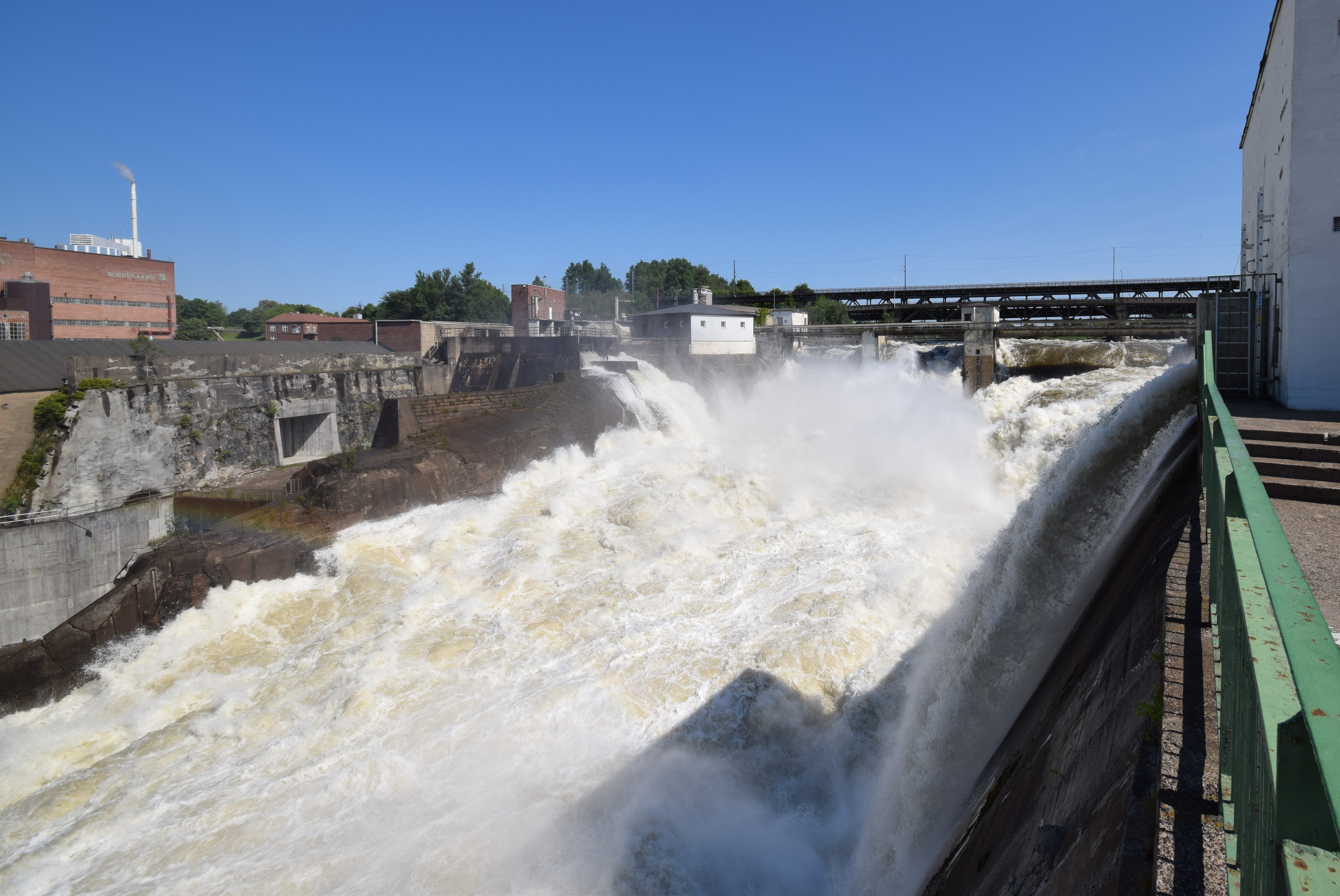 Flomvannføring i Sarpsfossen mai 2014.